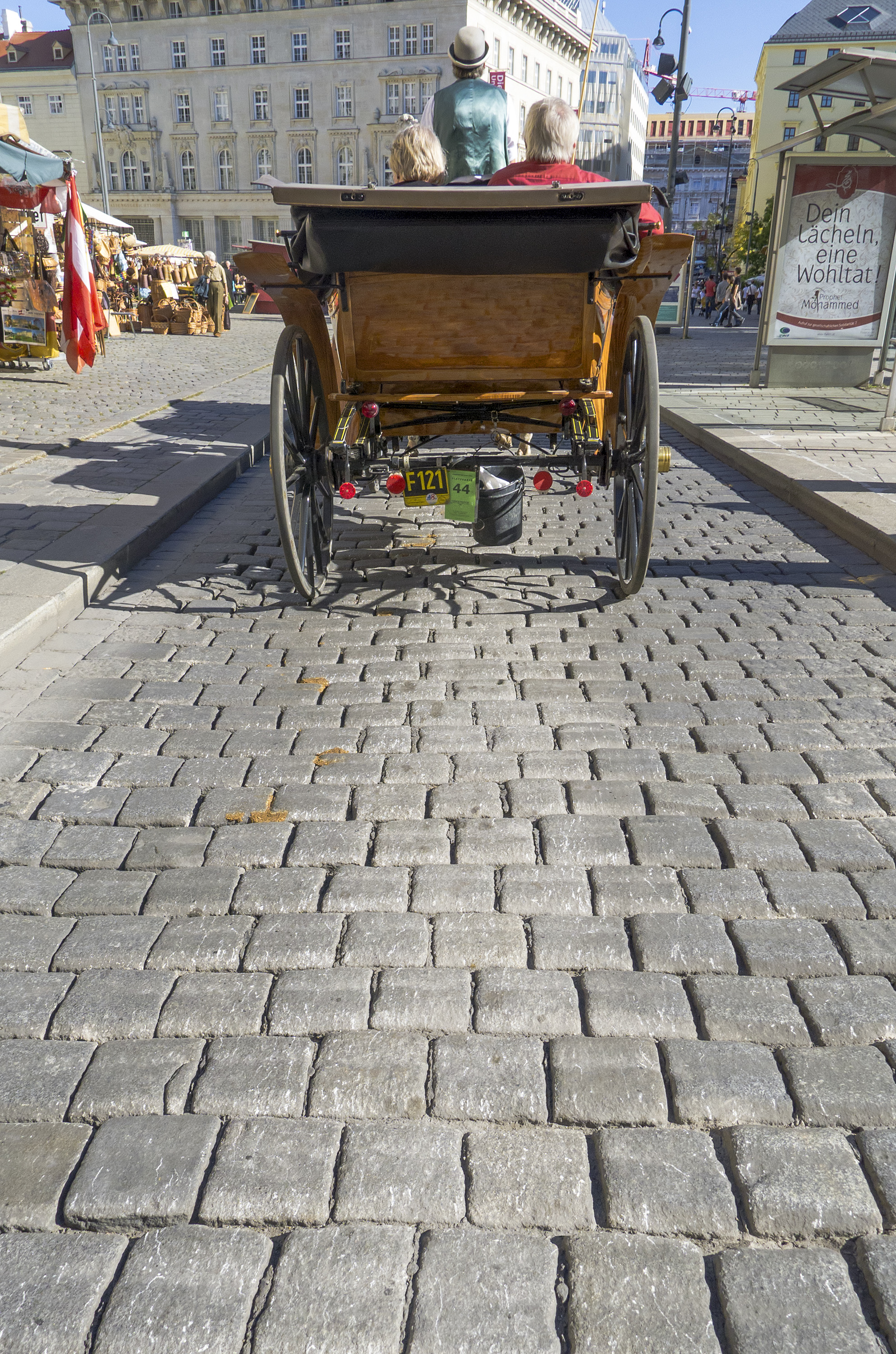 Abnützung von Pflastersteinen durch Pferdefuhrwerke in Wien 1, Freyung, Richtung Südosten